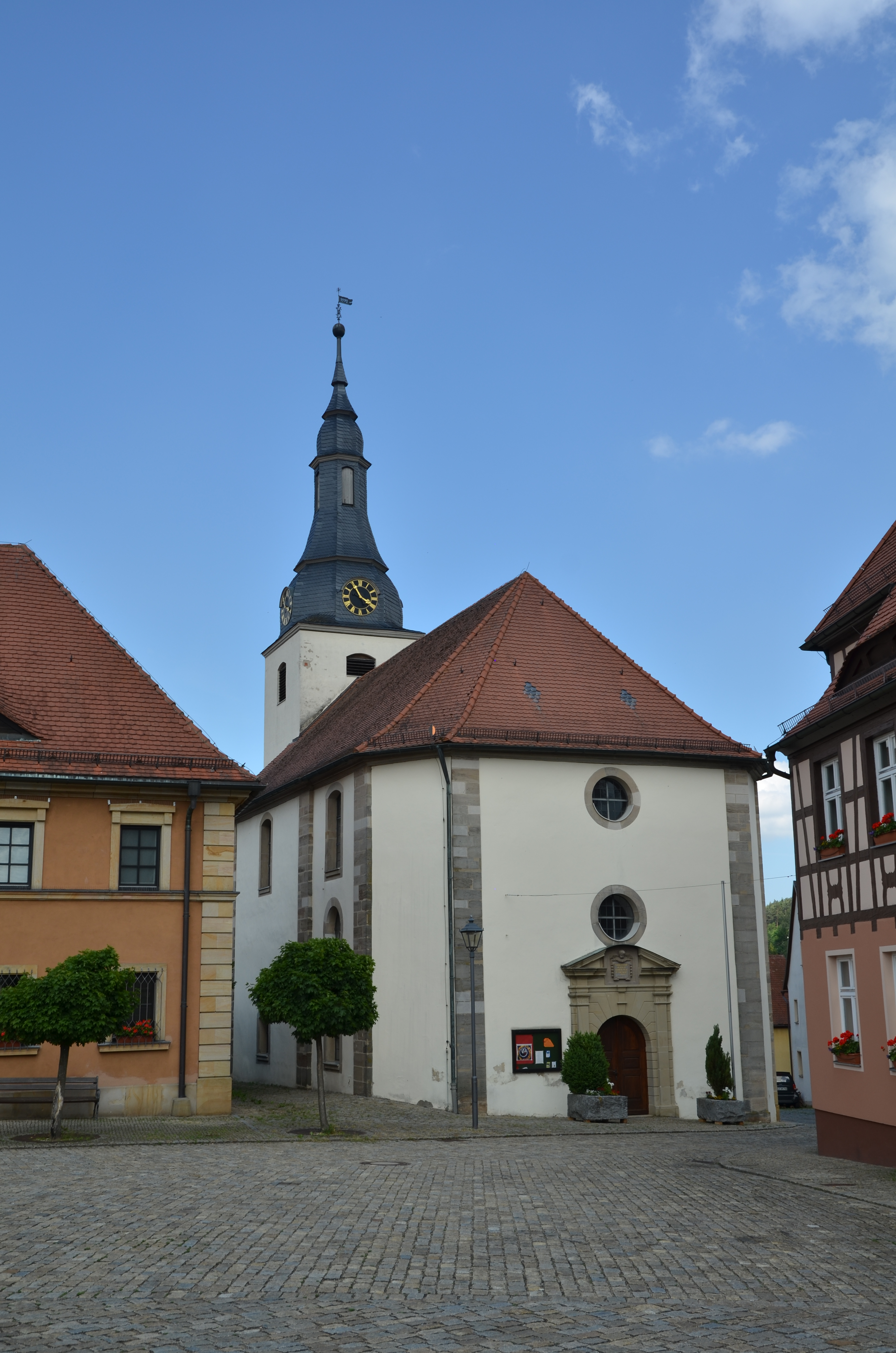 evang.-luth. Kirche St. Thomas in Neuhof an der Zenn